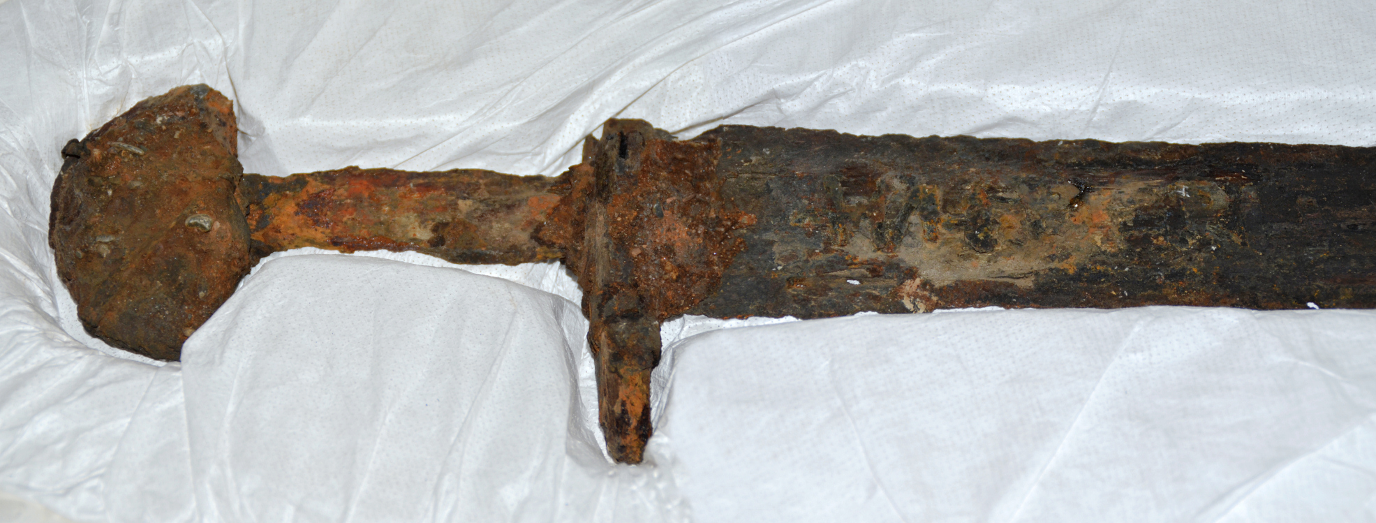 Schwert von Großenwieden, auf der Klinge Aufschrift +VLFBERH+T